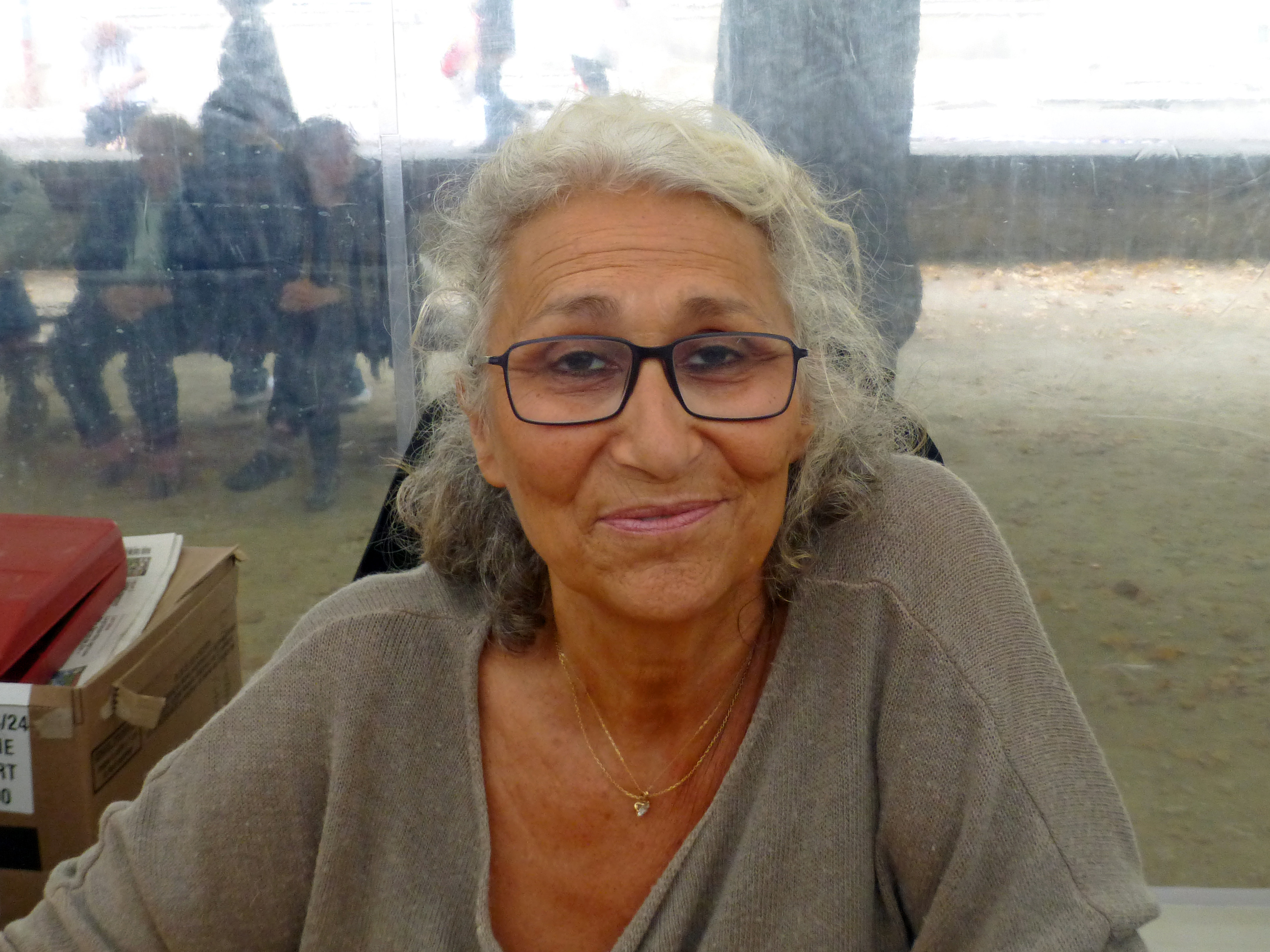 Sophie Chauveau au Livre sur la Place 2015 (Nancy)